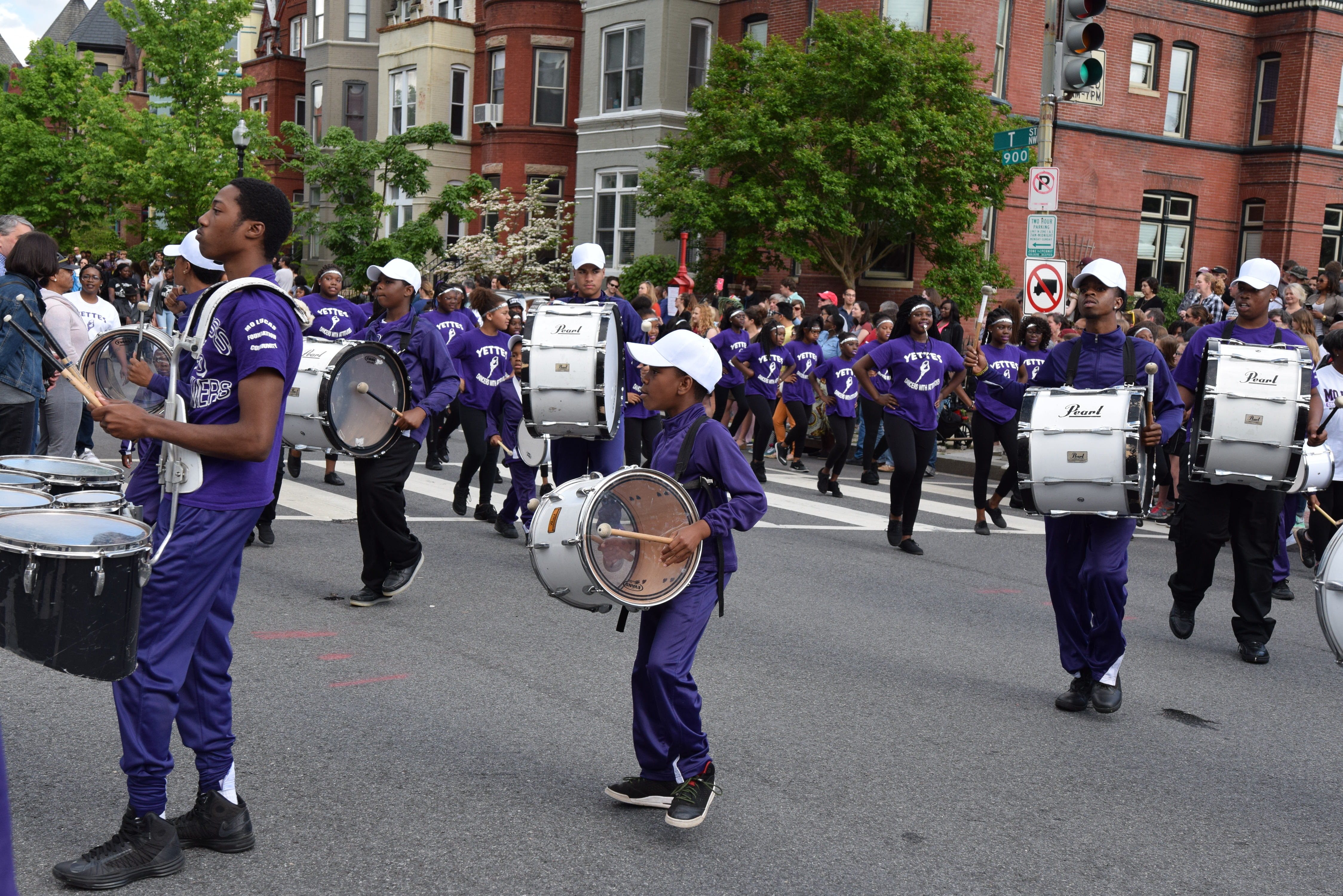 DC Funk Parade 2016